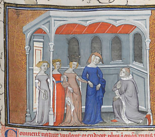 Iluminura Guillaume de Machaut et Nature do Prólogo das obras completas de Guillaume de Machaut